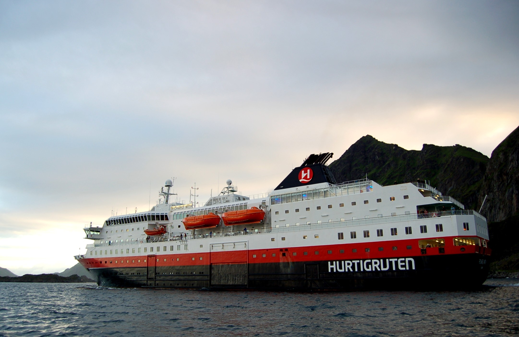 M/S Richard With i Stamsund